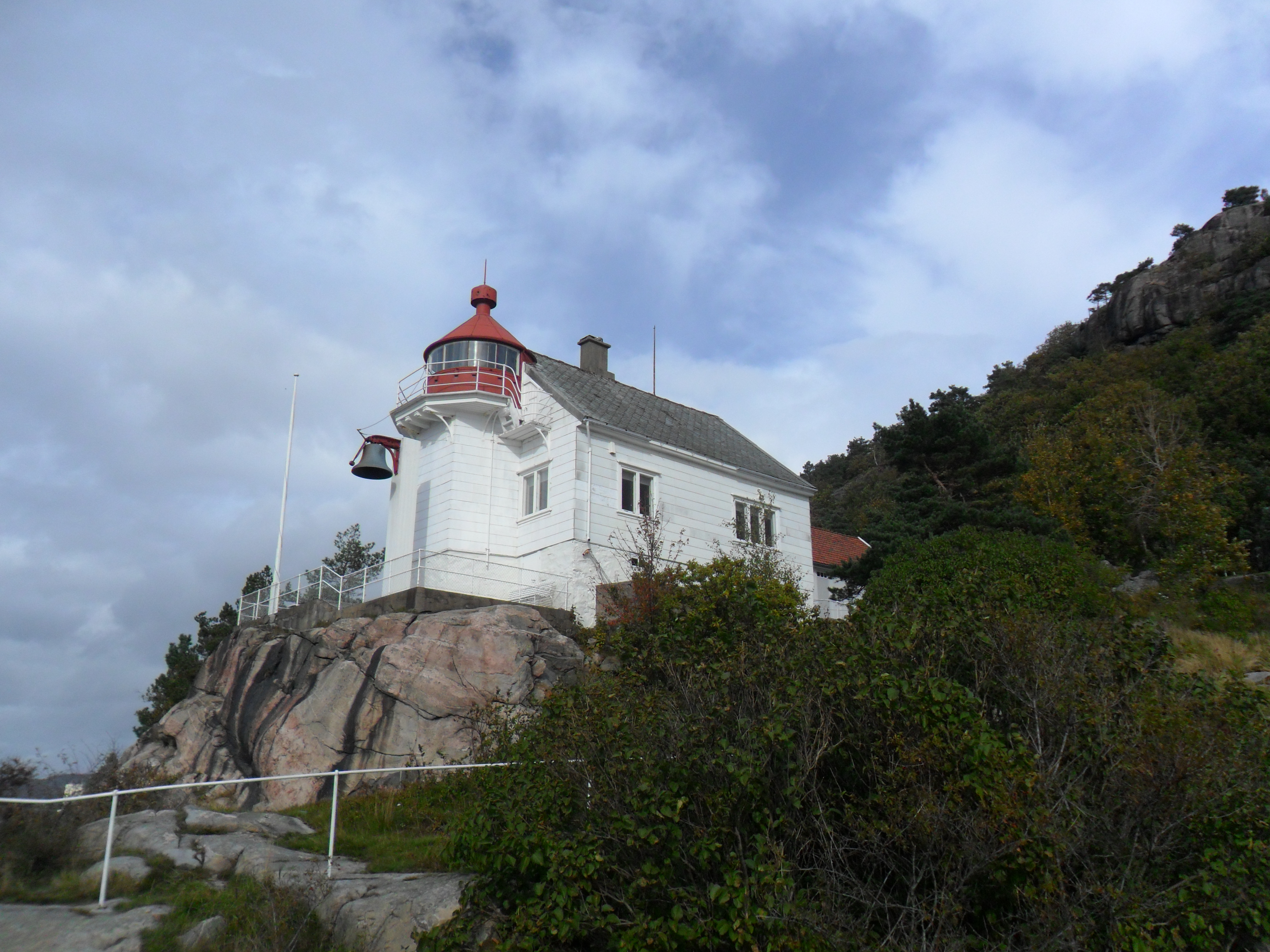 Odderöya light house, Kristiansand, Norway